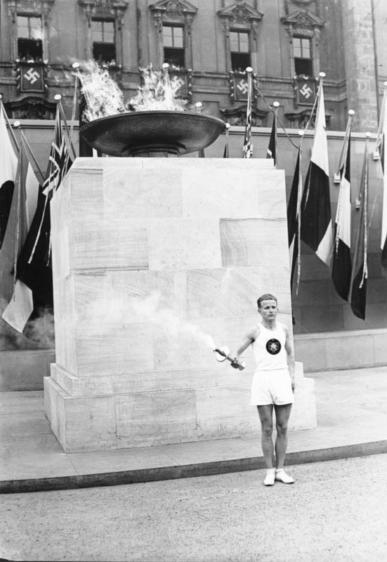 Berlin, Olympiade 1936 Fackelläufer des olympischen Feuers im Lustgarten vor dem alten Schloß